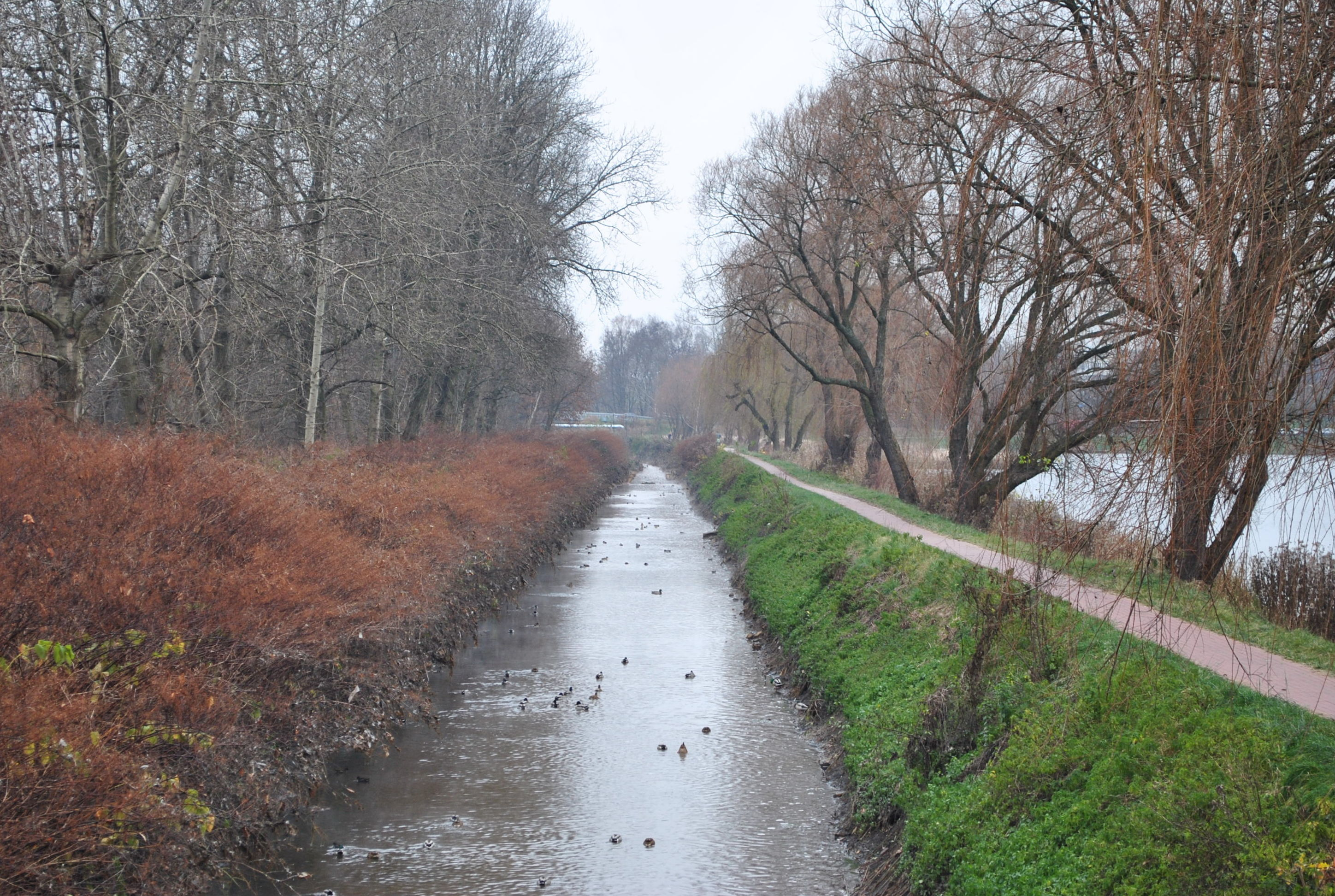 Katowice, Osiedle Tysiąclecia. Rawa